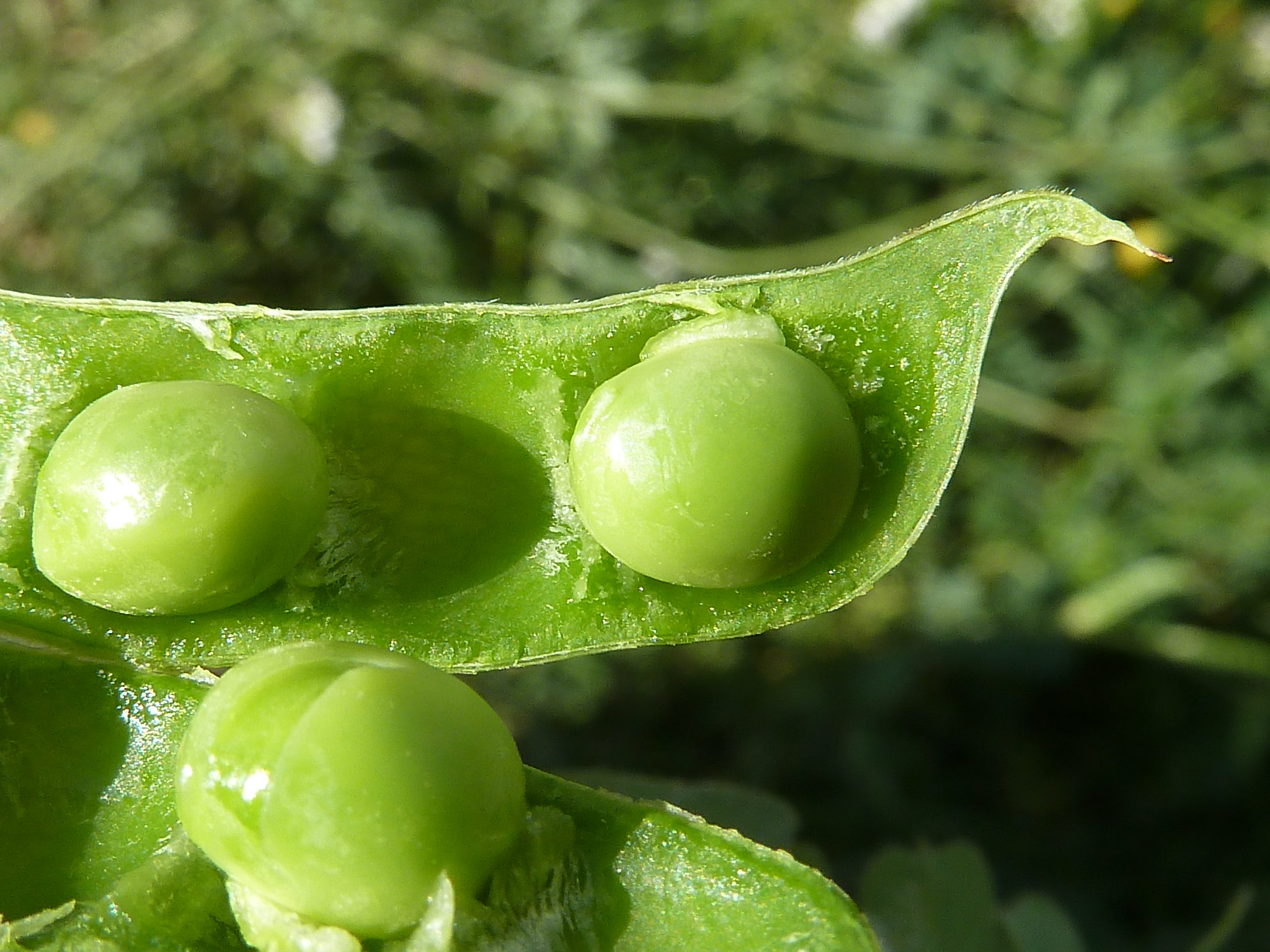 Pisum sativum (Guisante) : Guisantes inmaduros en el fruto abierto - Avenida de la Libertad, Albatera (Alicante, España).